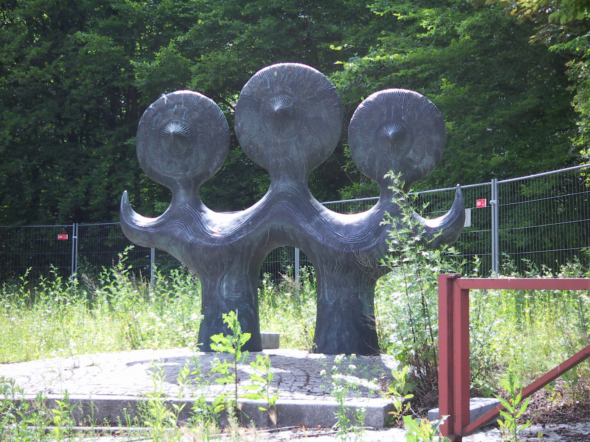 Stadt des Kindes, Wien Penzing , Plastik von Maria Biljan-Bilger